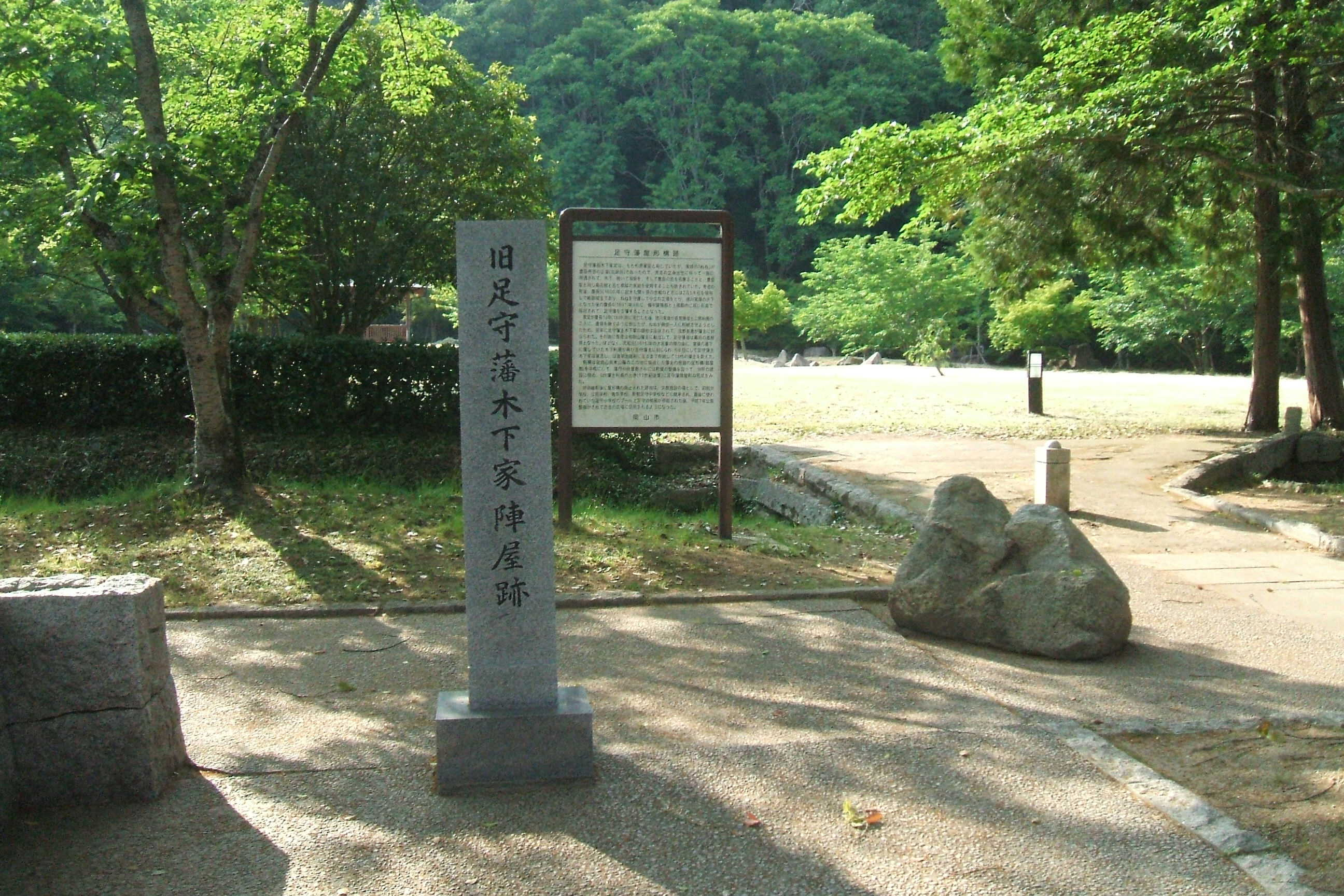 岡山県岡山市にある足守陣屋跡